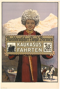 Werbeplakat für Kaukasusfahrten der Schifffahrtsgesellschaft Norddeutscher Lloyd Bremen